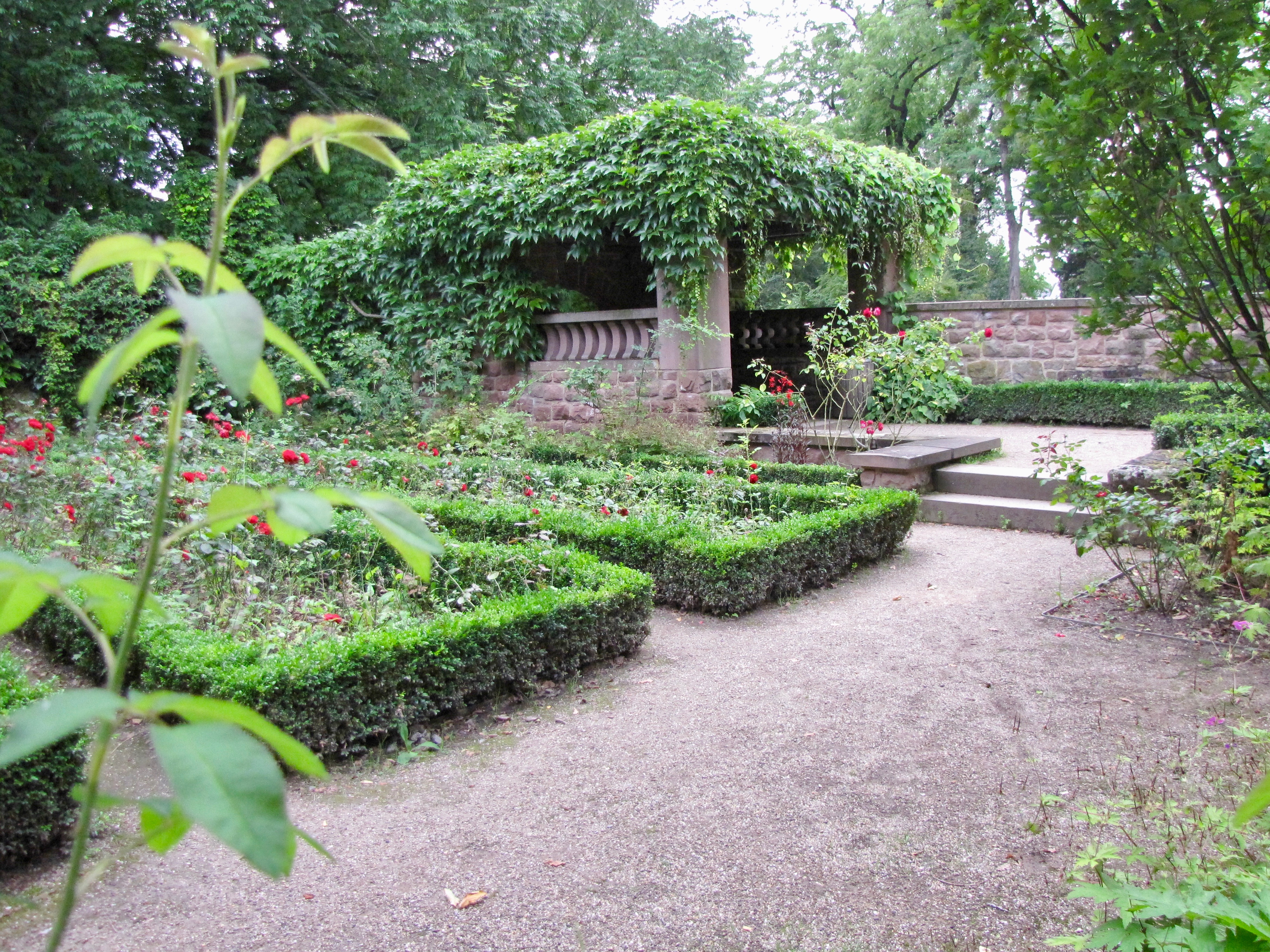 Flora (Köln): Der als Innenhof gestaltete rote Farbengarten des von J. Olbrich 1906 errichteten Frauenrosenhofes gilt als verwunschenes Kleinod des Jugendstils. Angestrebte Einheit von Garten und Haus.